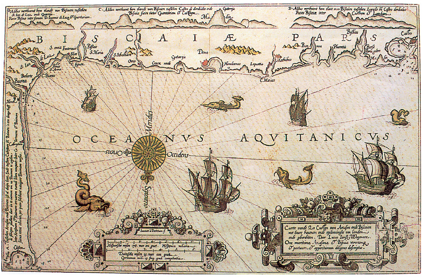 Itsas kartografia. Doer Lucas Ian Wagenaer. 1583. urtea. Holandan XVI. mendean egiten zen kartografiaren adierazgarri da, Herbehereek itsasketaz zuten ardura berezia erakusten duena. Mapa horrek kostaldea irudikatzen du, Arcachon-etik Bizkaiko mugetaraino. (Argazkia: J. G. Bilduma: J. R. S.).